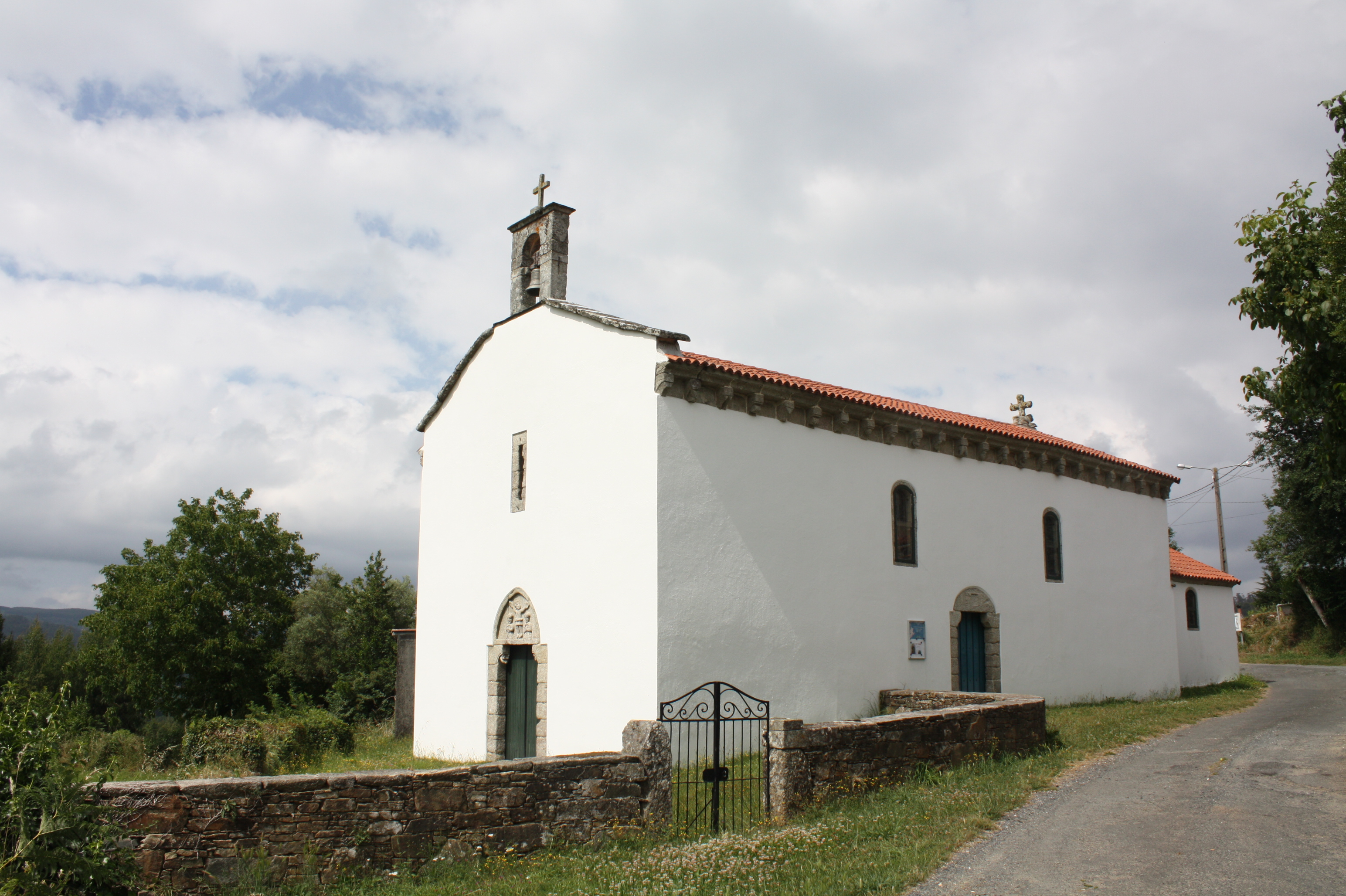 Igrexa de San Vicente de Vitiriz (Melide, A Coruña)